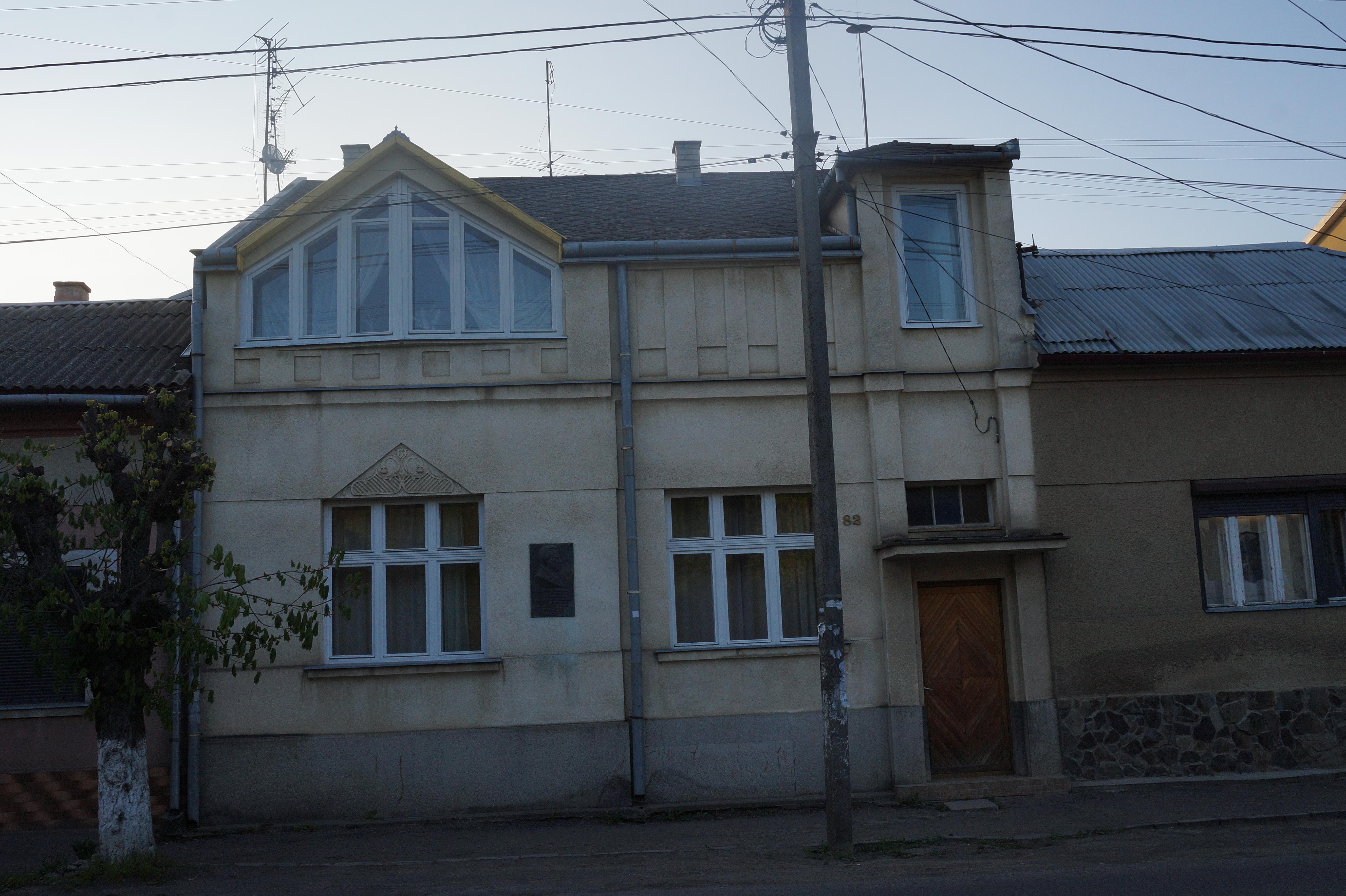 Будинок, в якому жив і працював закарпатський український письменник Томчаній М.І., Ужгород, вул. Берчені, 82